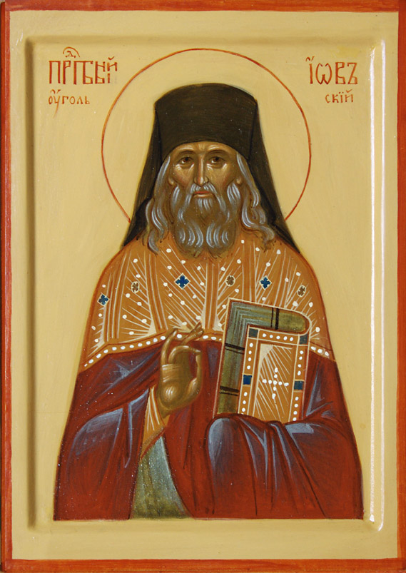 Икона. Преподобный Иов Угольский, Закарпатье, Мукачево, 2013